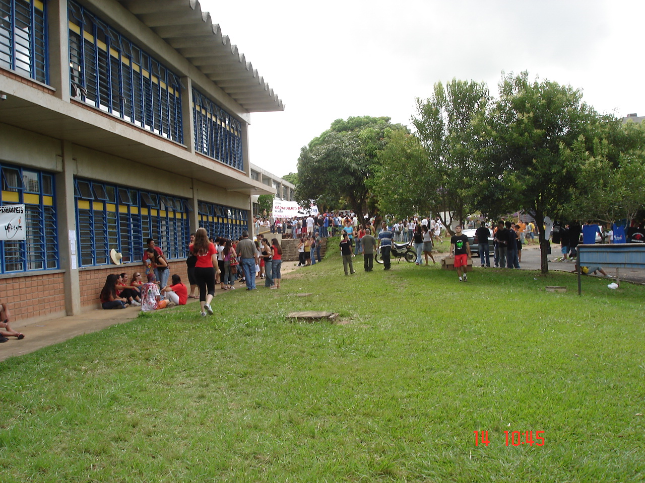 Campus da UFSCar na Calourada 2006